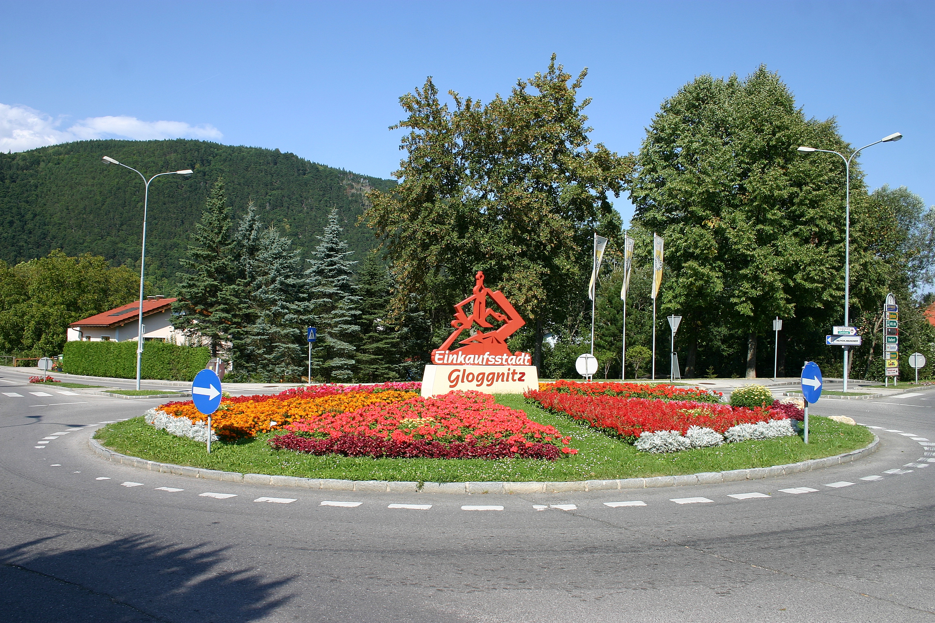 Gloggnitz, Kreisverkehr